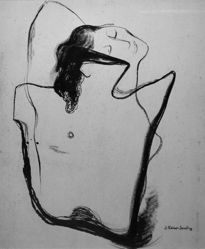 „Liebe“, Originaltitel, große Tuschezeichnung, signiert, um 1933. Graphisches Werkverzeichnis Nr. 183. Berliner Hochblütezeit. Josef Steiner wurde 1934 im Hamburger Tageblatt mit einer beschämenden Rezension bedacht, wegen stilistischer Abhängigkeit von dem „allzu begabten in Paris lebenden Juden Picasso“. Das graphische Werk „Liebe“ mag Gegenstand dieser diskreditierenden Publikation gewesen sein, da die Entstehungszeit und die Picasso-esque Motivik ebenso stimmig sind, wie die großformatige Ausarbeitung des Sujets als fertig komponierte Federzeichnung mit voller Signatur „J. Steiner-Sendling“. Diese Handgraphik stellt eines der Hauptwerke aus dem graphischen Nachlass von Josef Steiner dar.